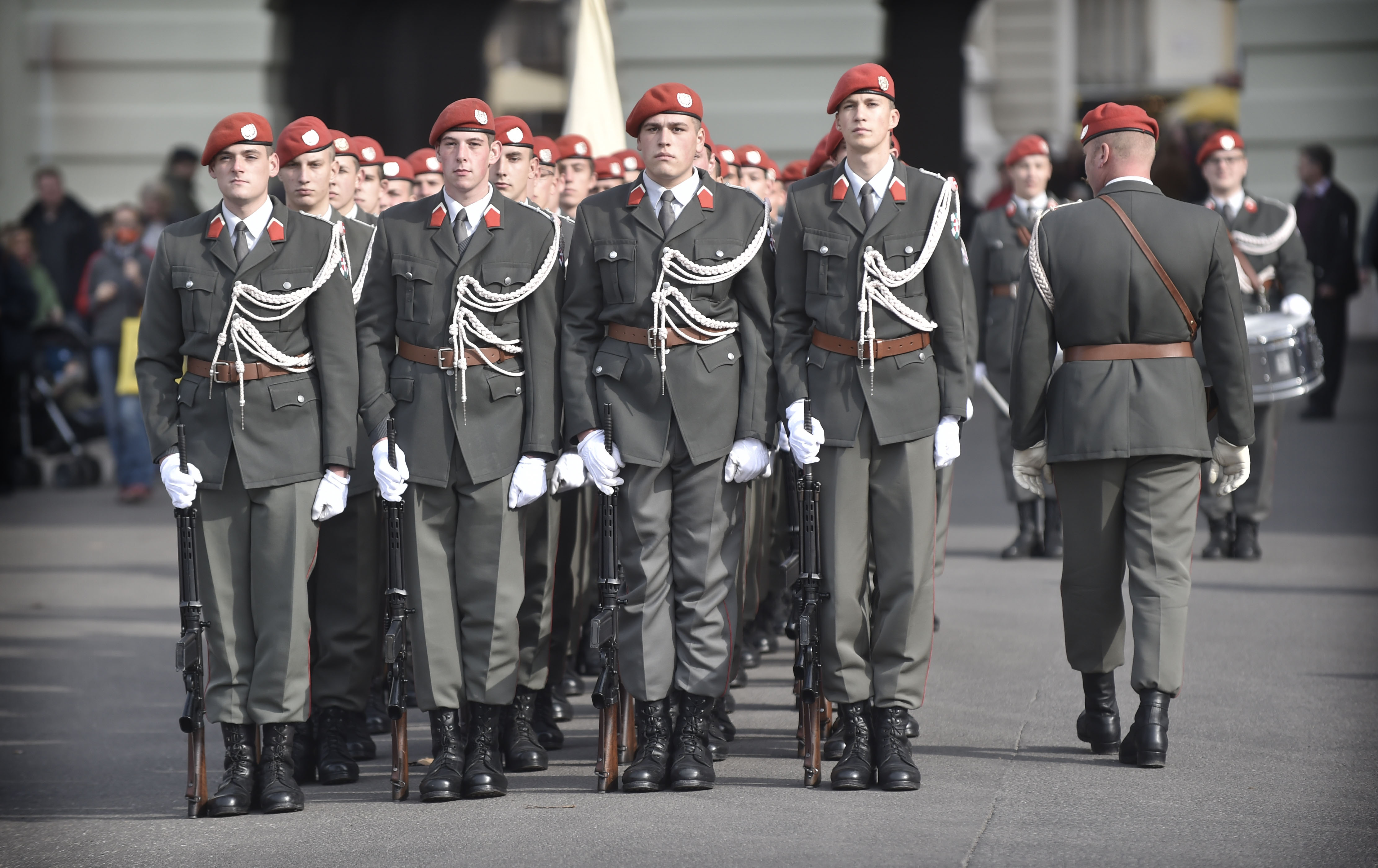 Garde-Soldaten nehmen Aufstellung.